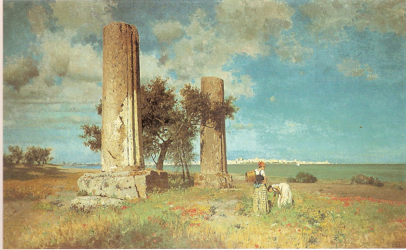 i ruderi di Giove Olimpico a Siracusa”, è databile all’incirca entro il 1891, data in cui venne esposto presso l’Esposizione Nazionale di Palermo (1891-92). Ora esposto al Palazzo dei normanni di Palermo